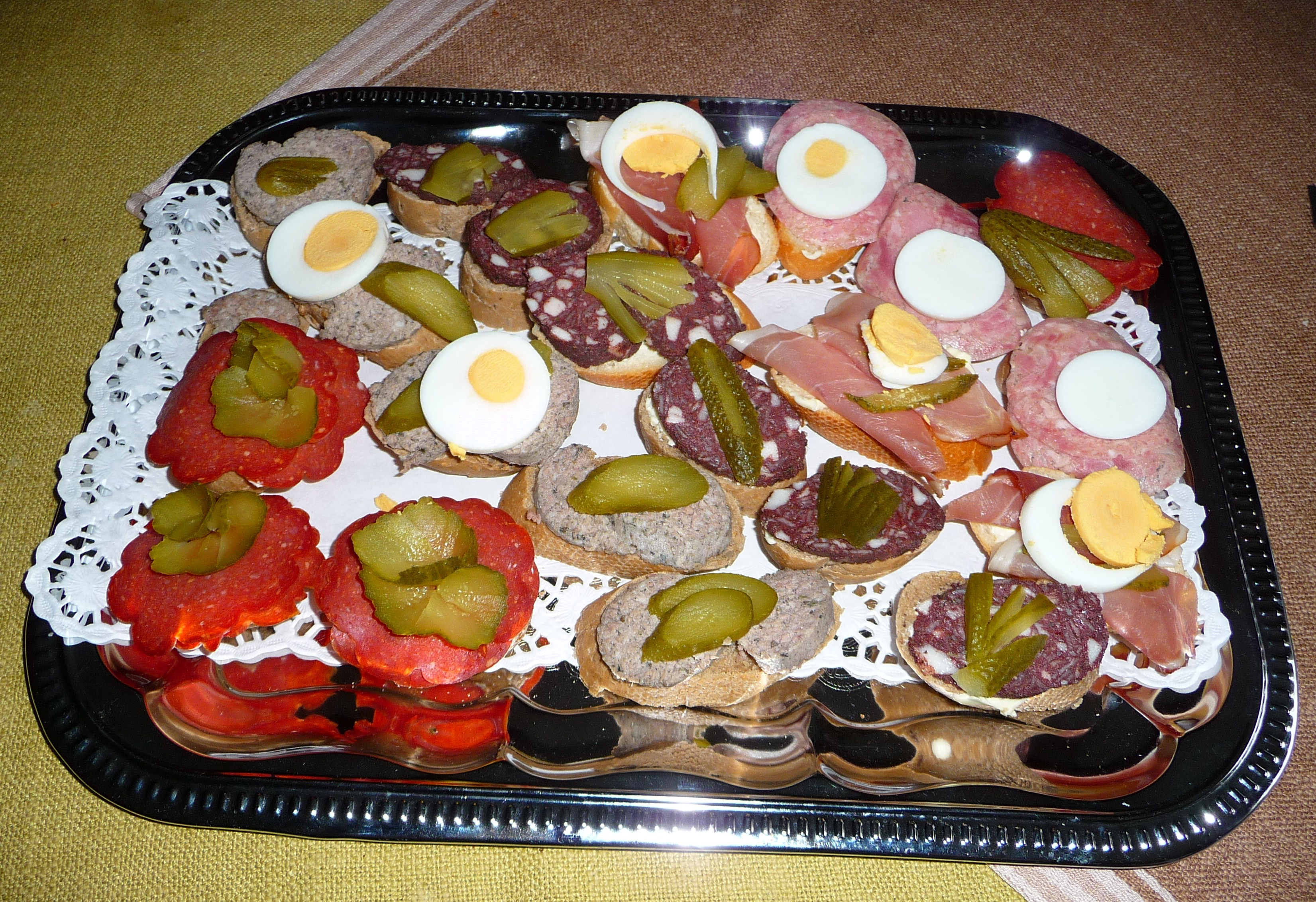 Schnittchen